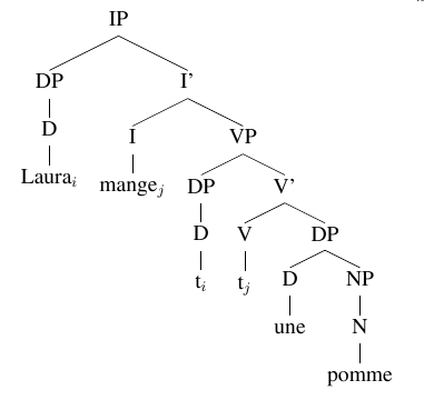 Dérivation de la phrase "Laura mange une pomme" selon la théorie X-barre